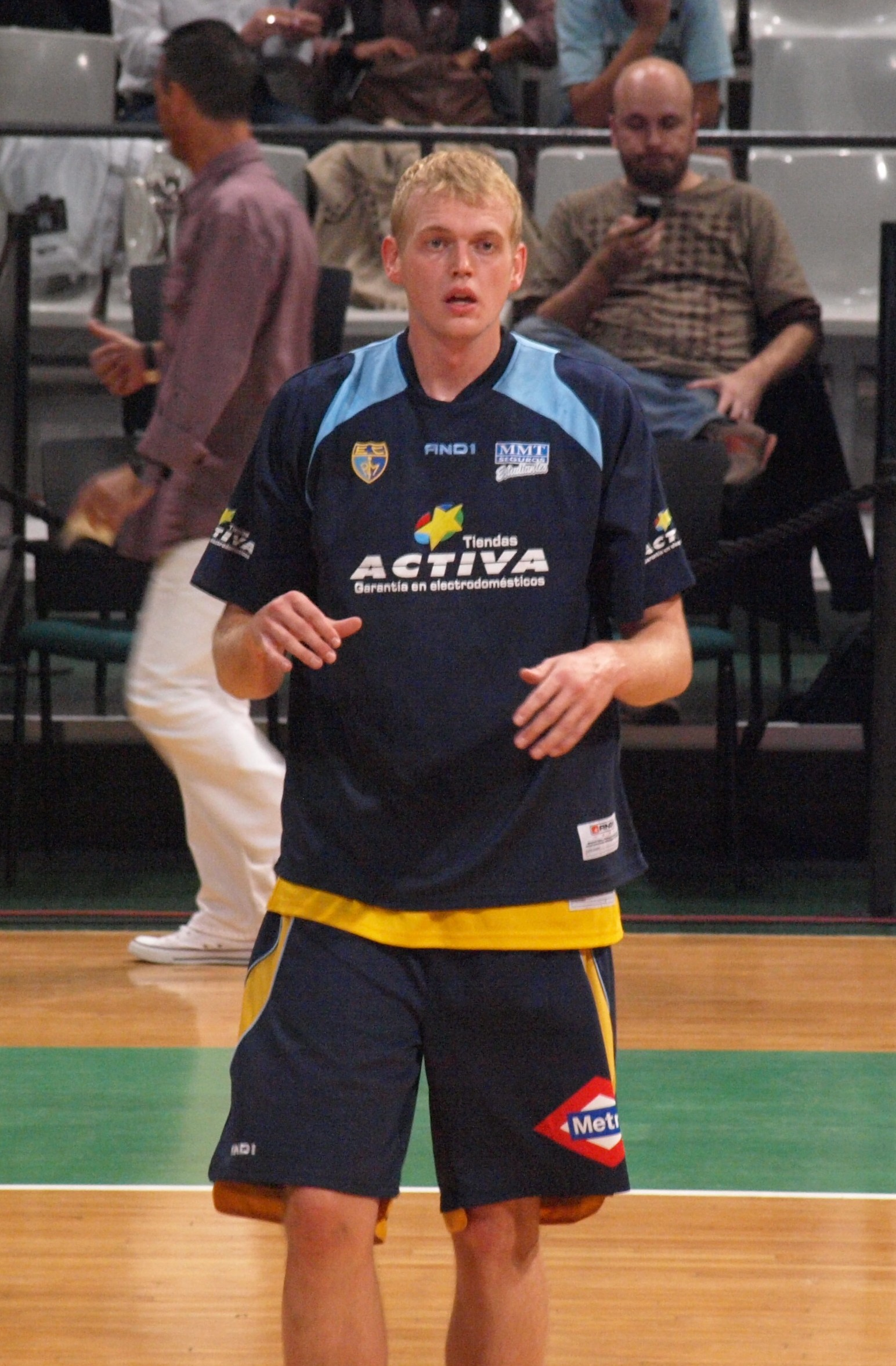 Daniel Clark en el calentamiento previo al partido de la segunda jornada de la liga ACB 2008-09 que enfrentó al Estudiantes y al DKV Joventut en el Olímpico de Badalona.